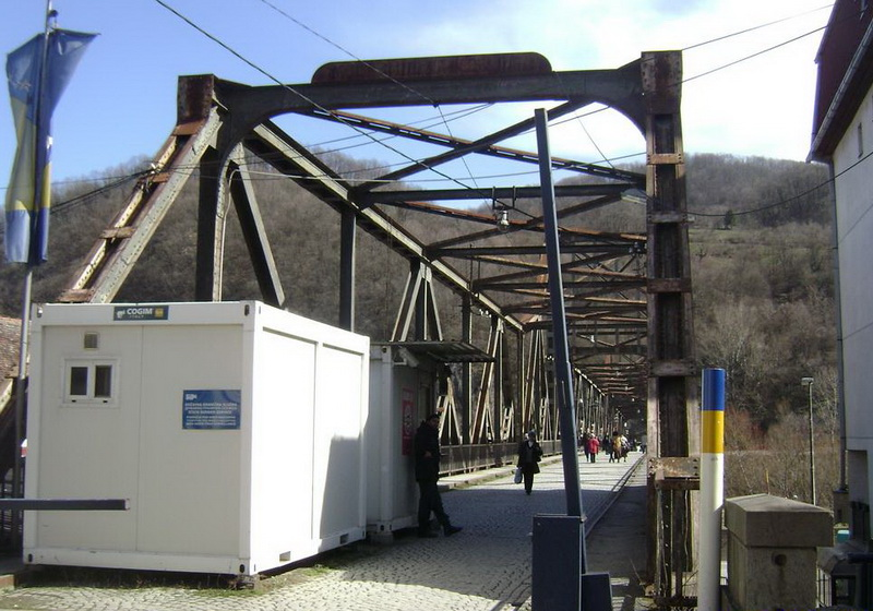 Granični prelaz između Zvornika (BiH) i Malog Zvornika (SRB) nalazi se nedaleko od samog centra grada Zvornika. Za prelaz se koristi Stari most ili Most Kralja Aleksandra I Karađorđevića. Nekada se prelazilo sa automobilima da bi danas preko njega prelazili samo pješaci.